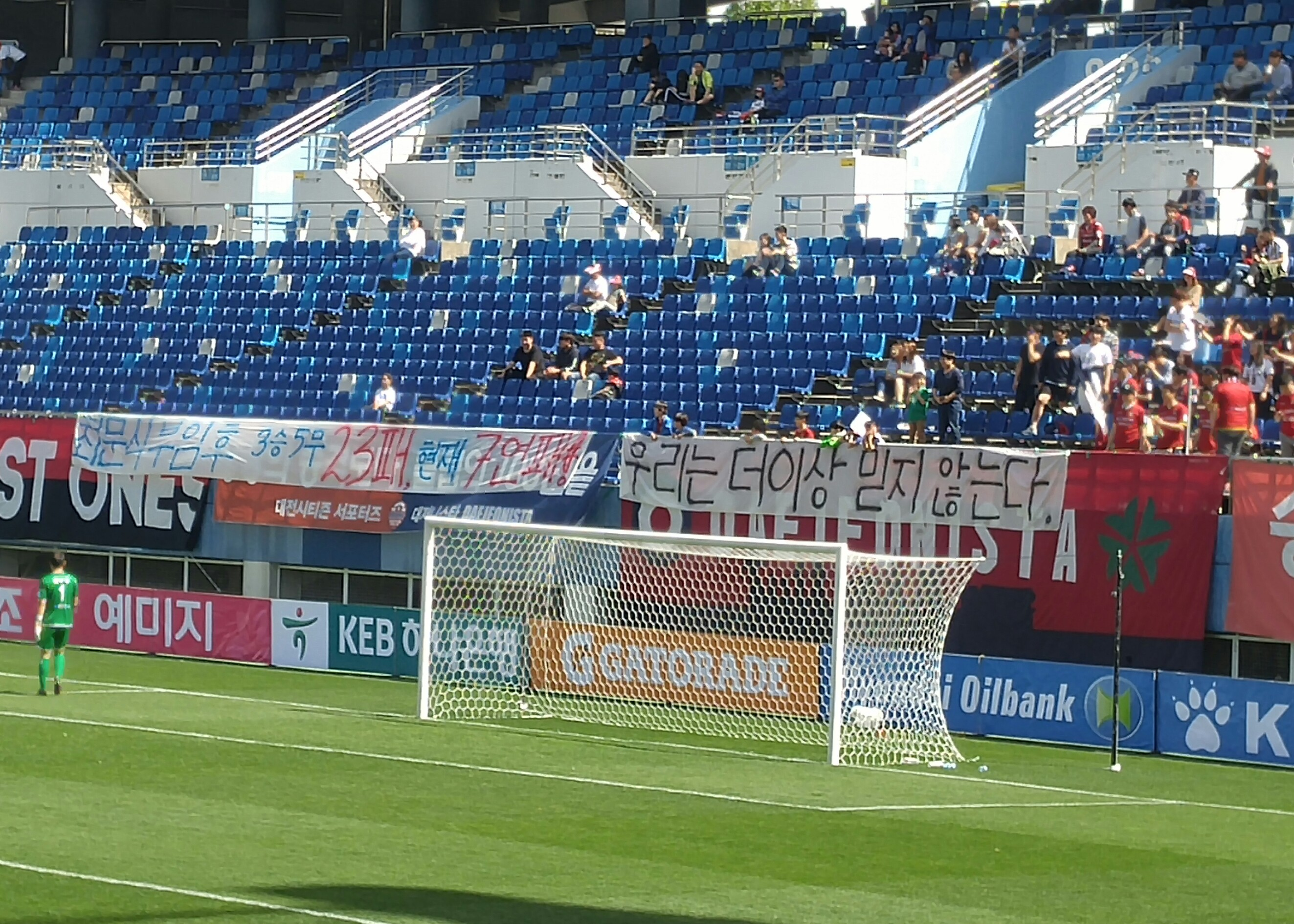 최문식 감독에 항의를 표하는 내용의 걸개를 내걸은 대전팬들